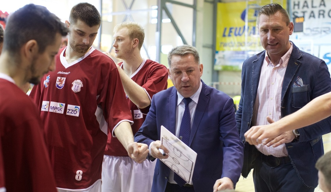 Trener Spójni Stargard Krzysztof Koziorowicz podczas meczu z GKS Tychy (22.04.2017)